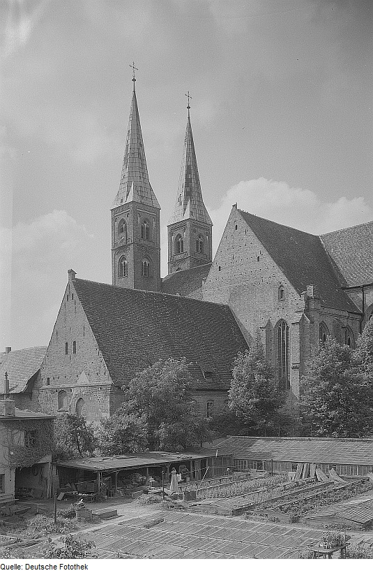 Original image description from the Deutsche Fotothek Stendal. Dom St. Nikolaus